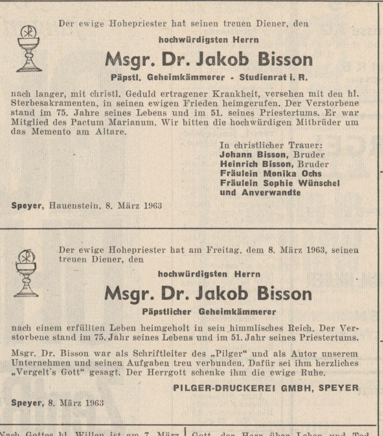 Msgr. Dr. Jakob Bisson, Speyer, Historiker und Theologe, Todesanzeige